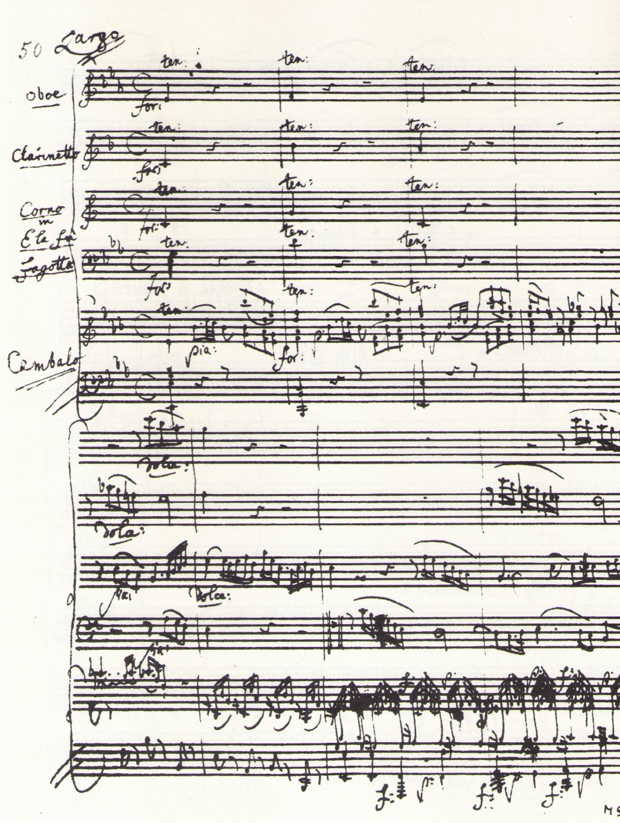 نت دستنویس کوئینتت پیانو ک.452